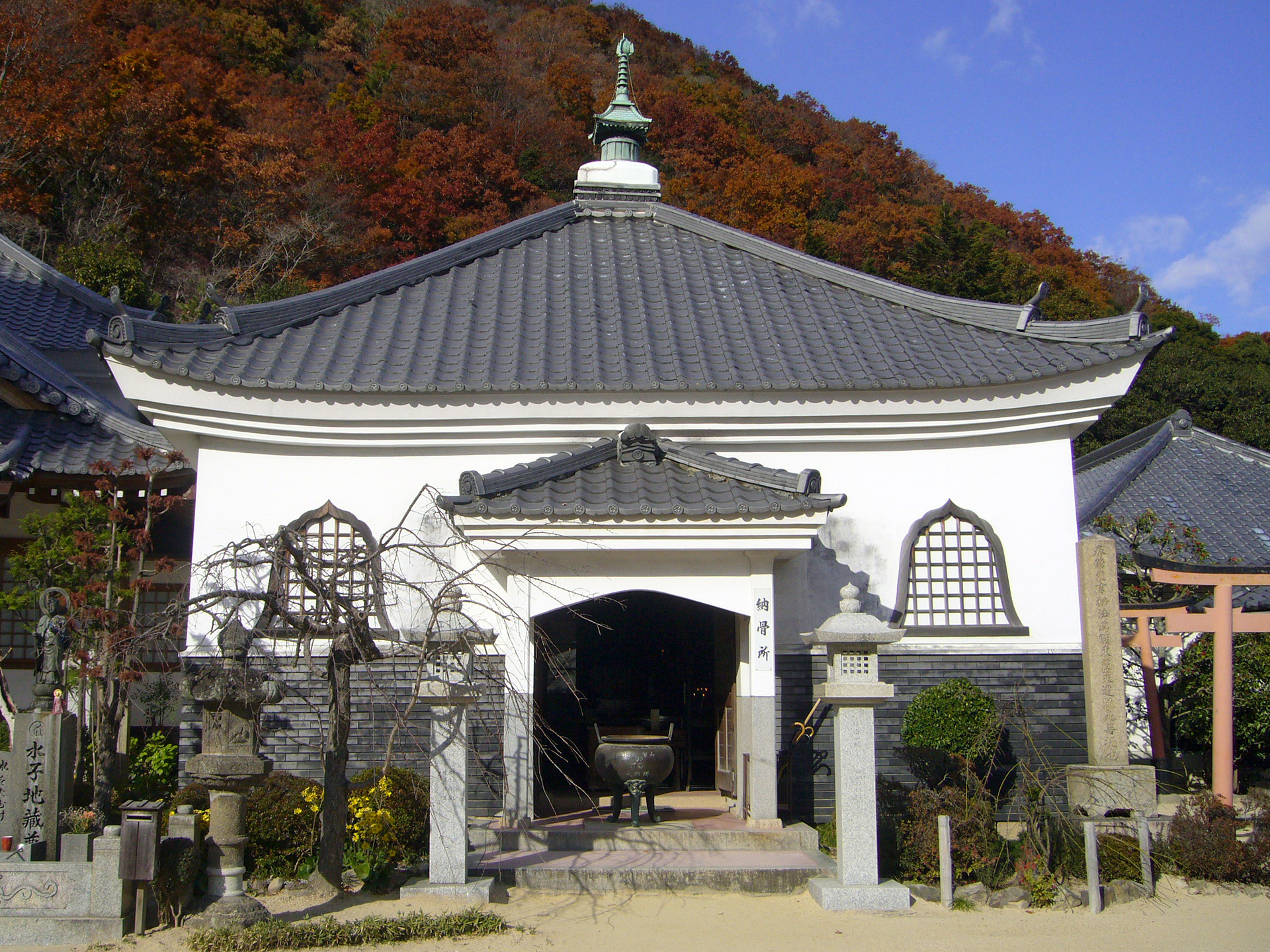 Kannoji in Nishinomiya, Hyogo prefecture, Japan